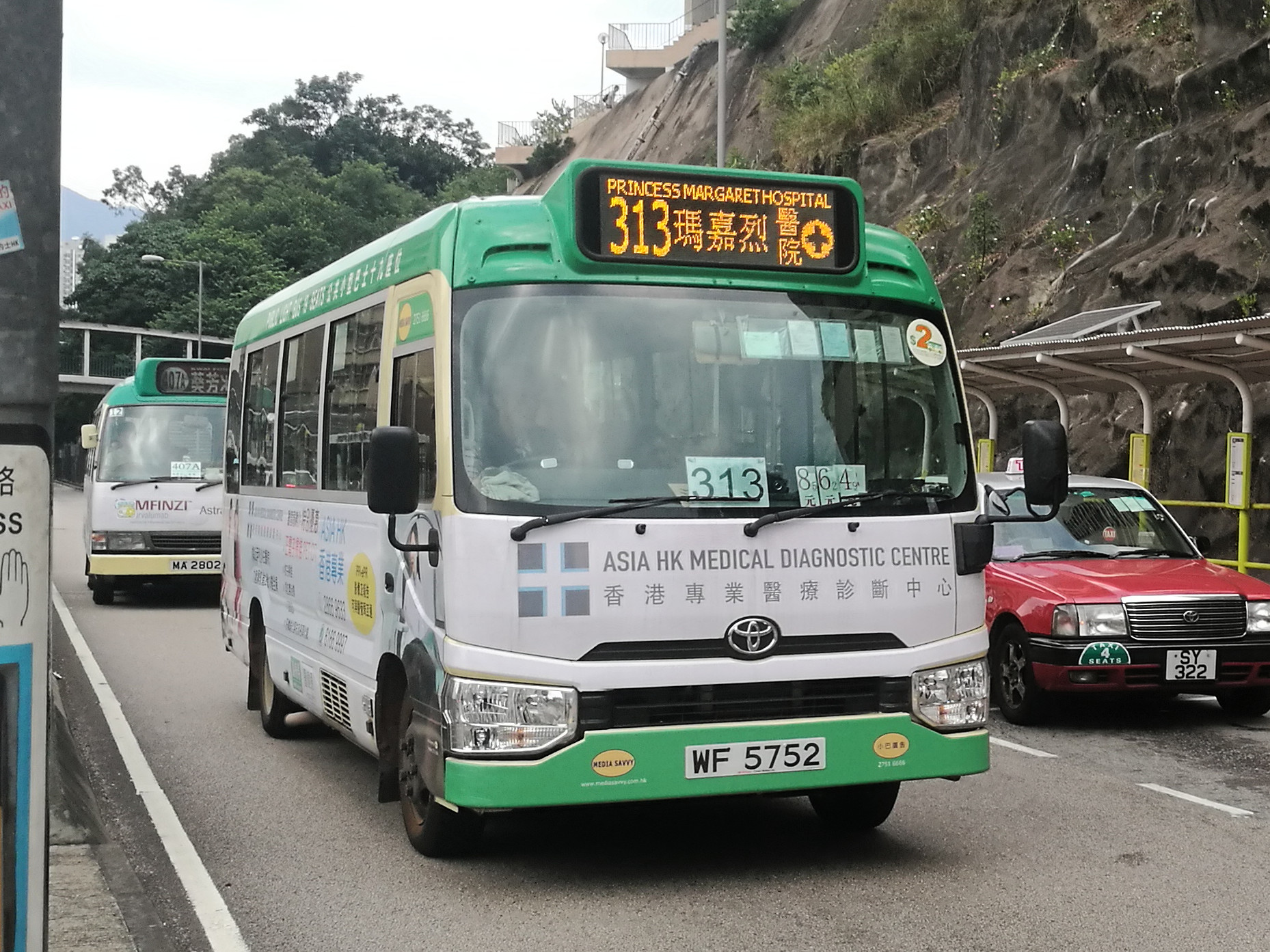 小巴WF5752的照片